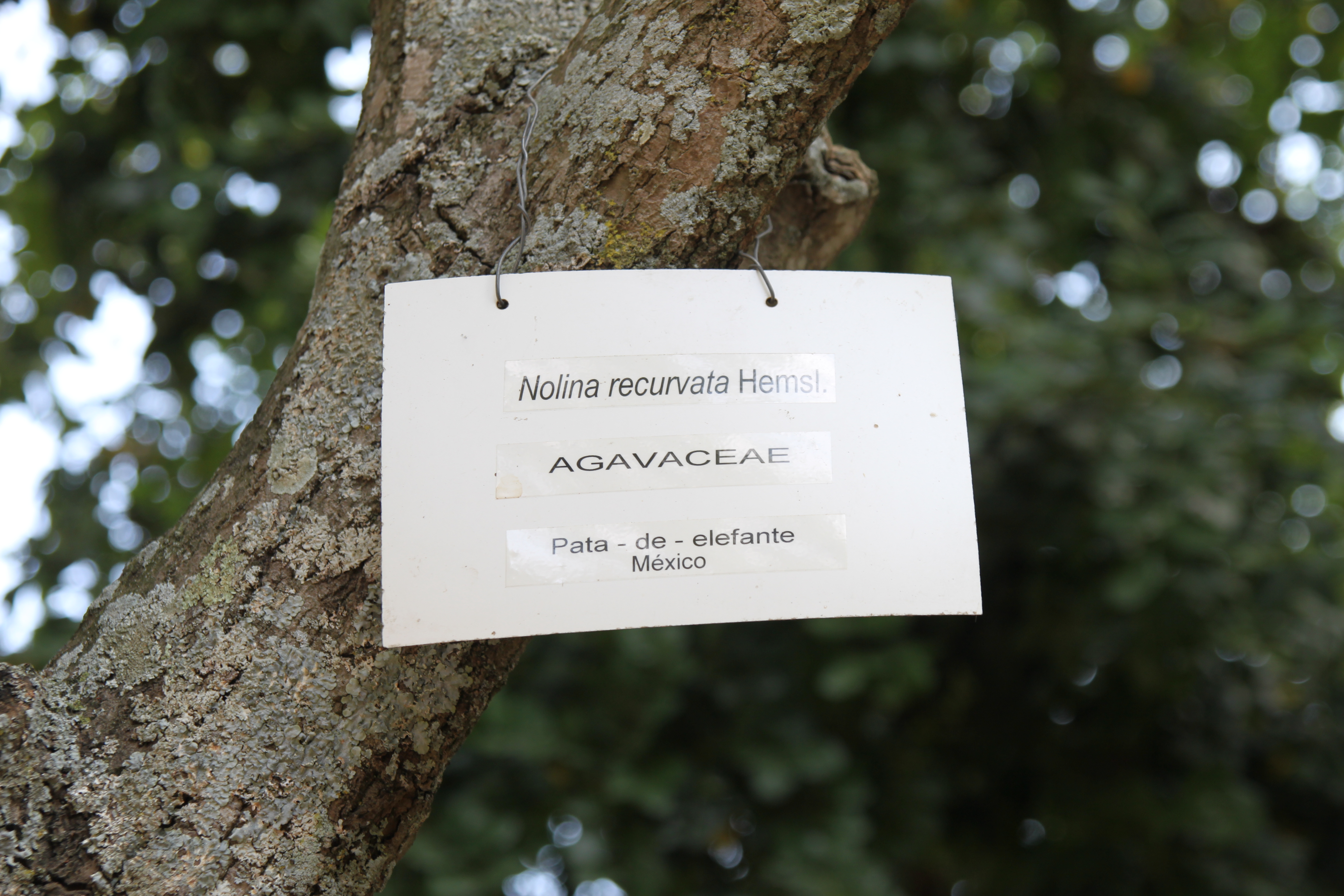 Zona circundante do Palácio Nacional da Ajuda This file was uploaded for Wiki Loves Monuments in Portugal with the unique identifier 72758.